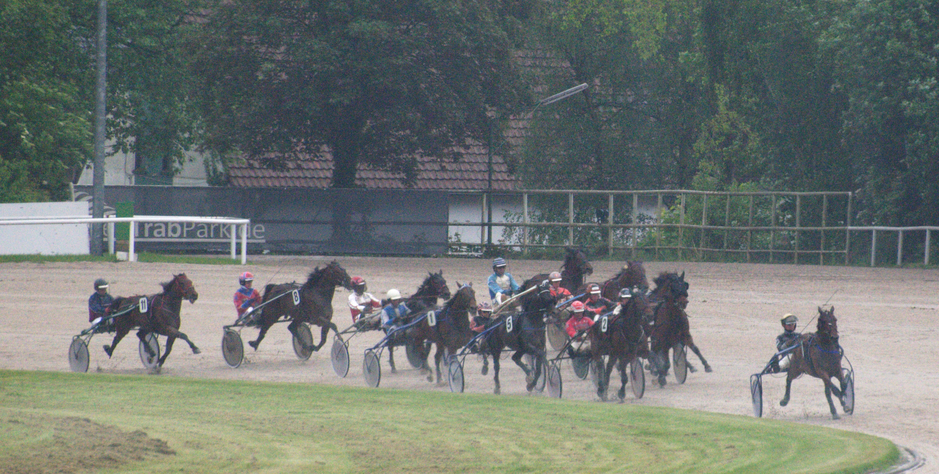 Helden und Helfer-Renntag auf der Trabrennbahn Gelsenkirchen (Gelsentrabpark) am 26. Mai 2013 1. ELE Super-Jackpot-Rennen